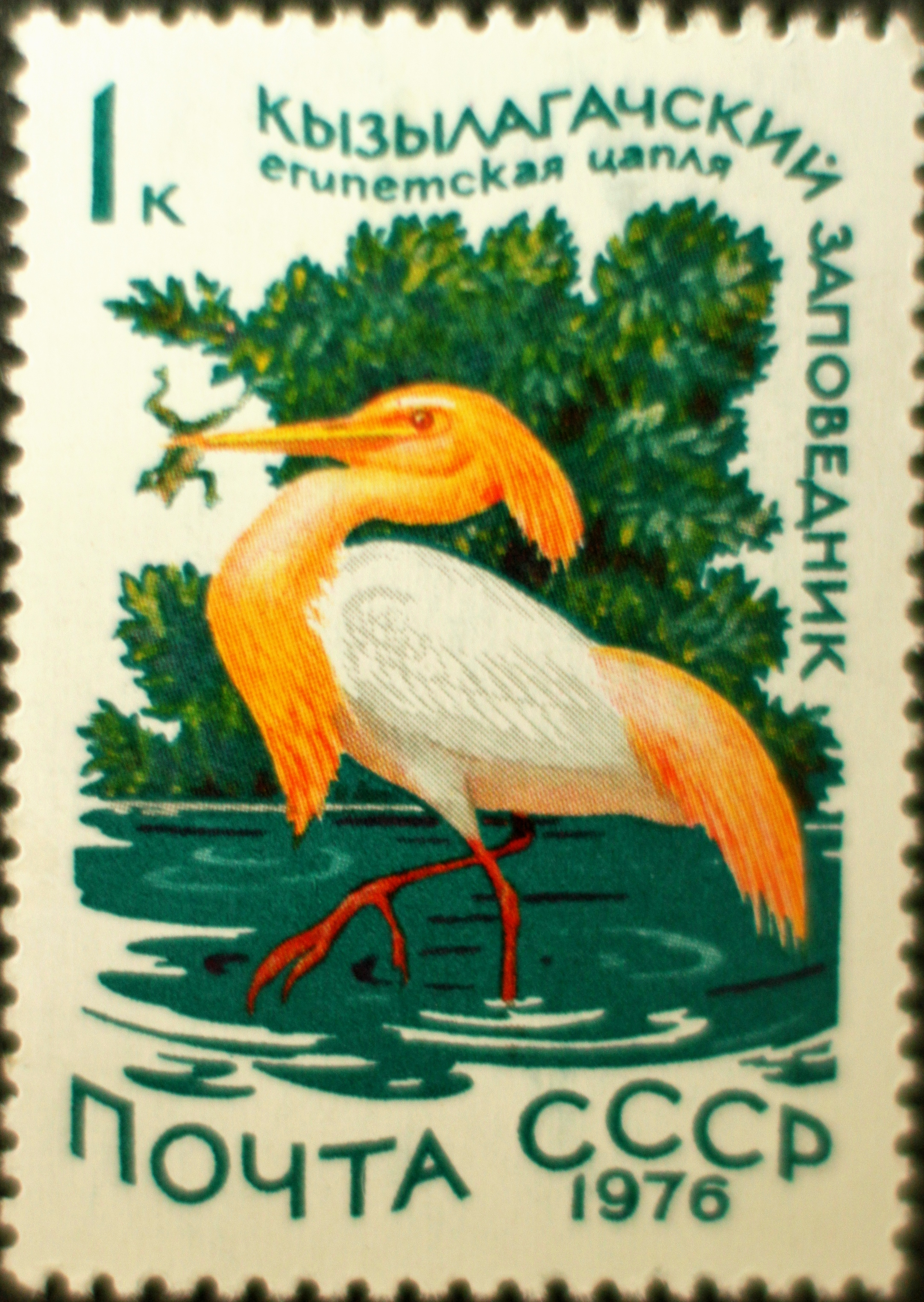 Briefmarke, Sowjetunion